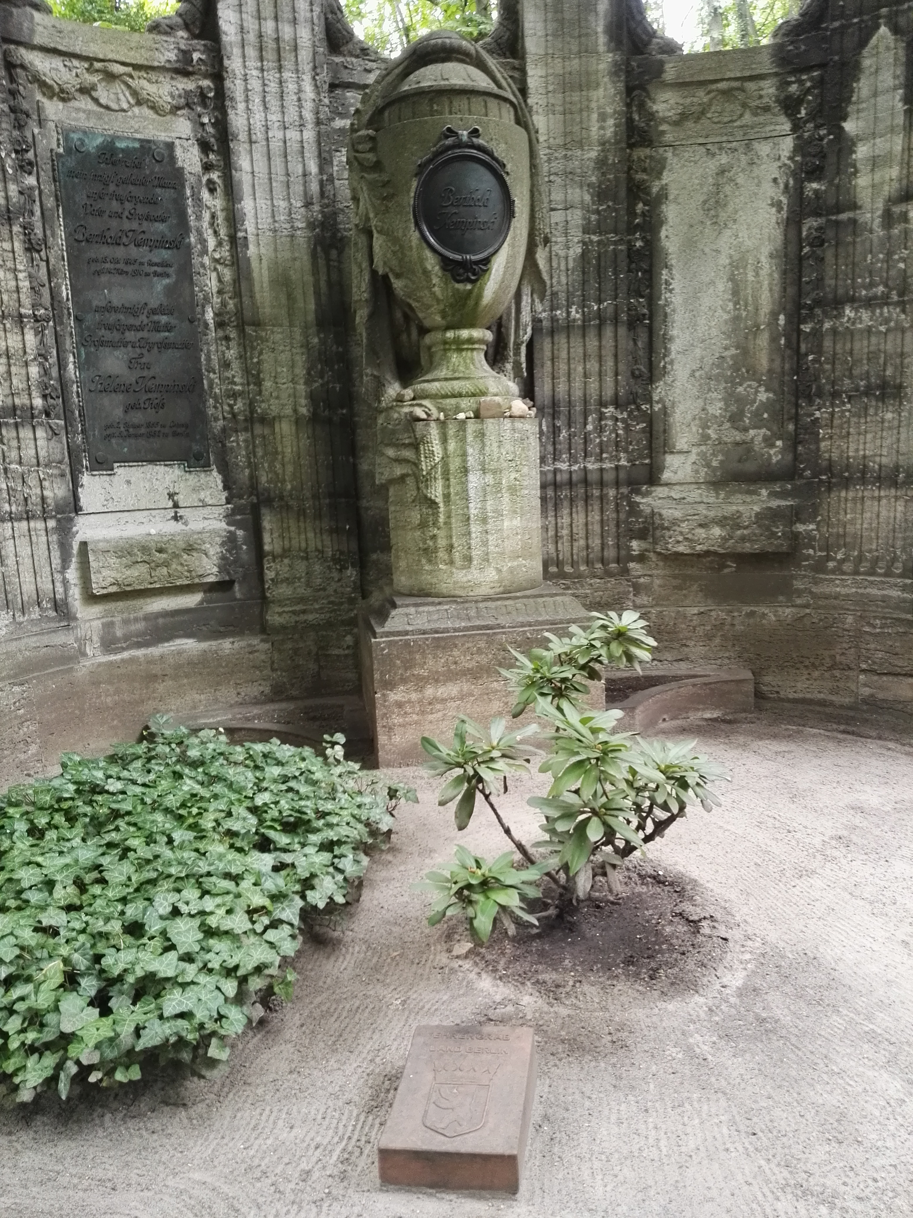 Ehrengrab von Berthold Kempinski auf dem Jüdischen Friedhof Berlin-Weißensee